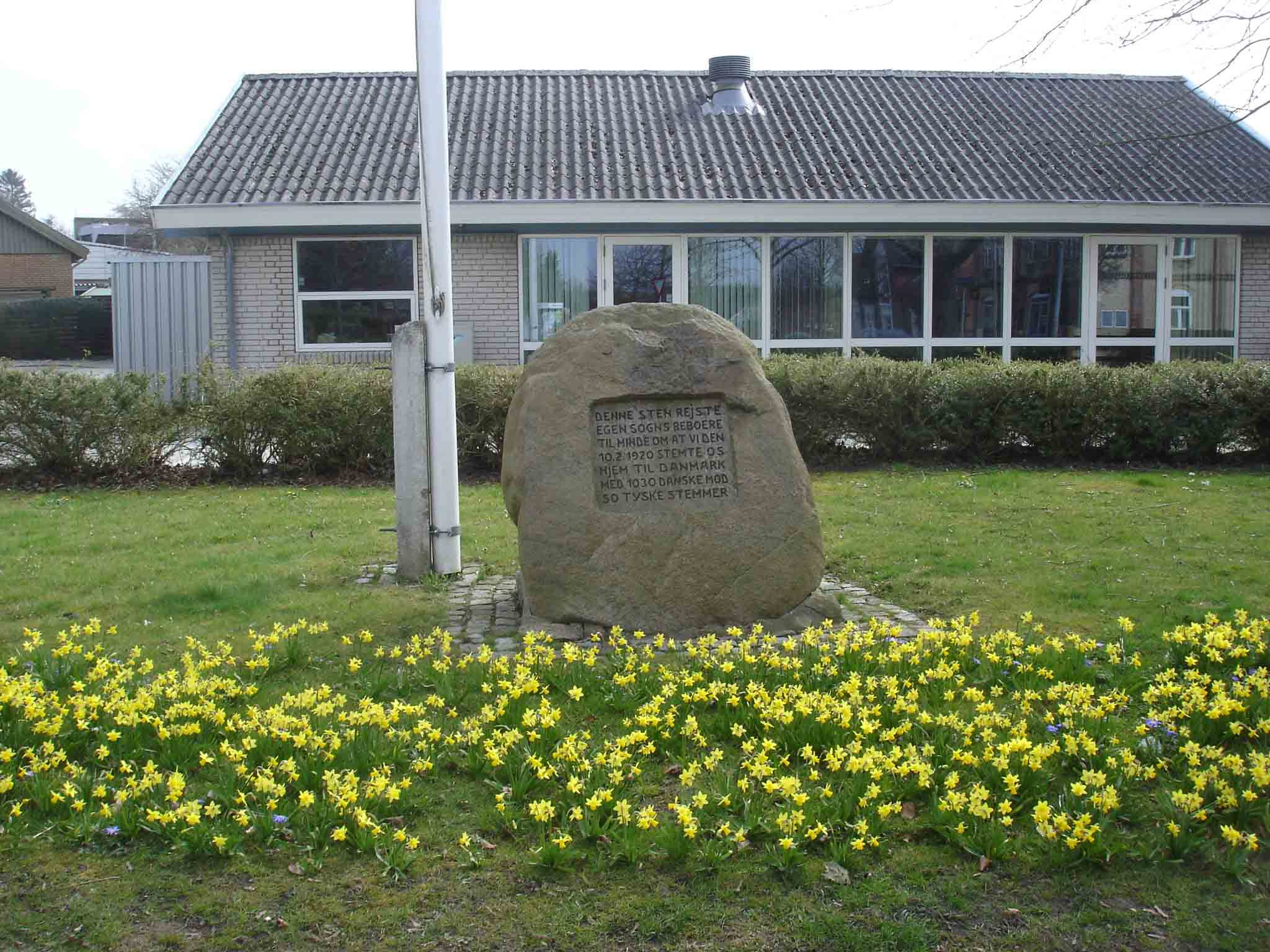 Genforeningssten på Torvet i Guderup. Egen Sogn stemte sig hjem til Danmark i 1920 med 1030 danske stemmer mod 50 tyske.